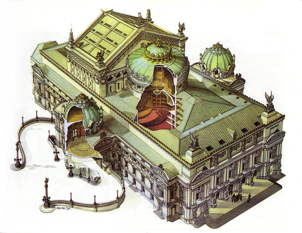 Entwurfs- und Modellzeichnung der Opéra Paris